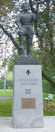 Monument de Guillaume Couture. Guillaume Couture (14 janvier 1618 - 4 avril 1701) est un coureur des bois et un colonisateur français. Il fut le premier européen qui est venu s'installer sur la seigneurie de Lauzon (aujourd'hui Ville de Lévis) en 1647. Cette seigneurie était située au sud de la Ville de Québec, précisément dans le secteur nommé Pointe-Lévy[1]. Il est l'ancêtre de tous les Couture de l'Amérique du Nord.